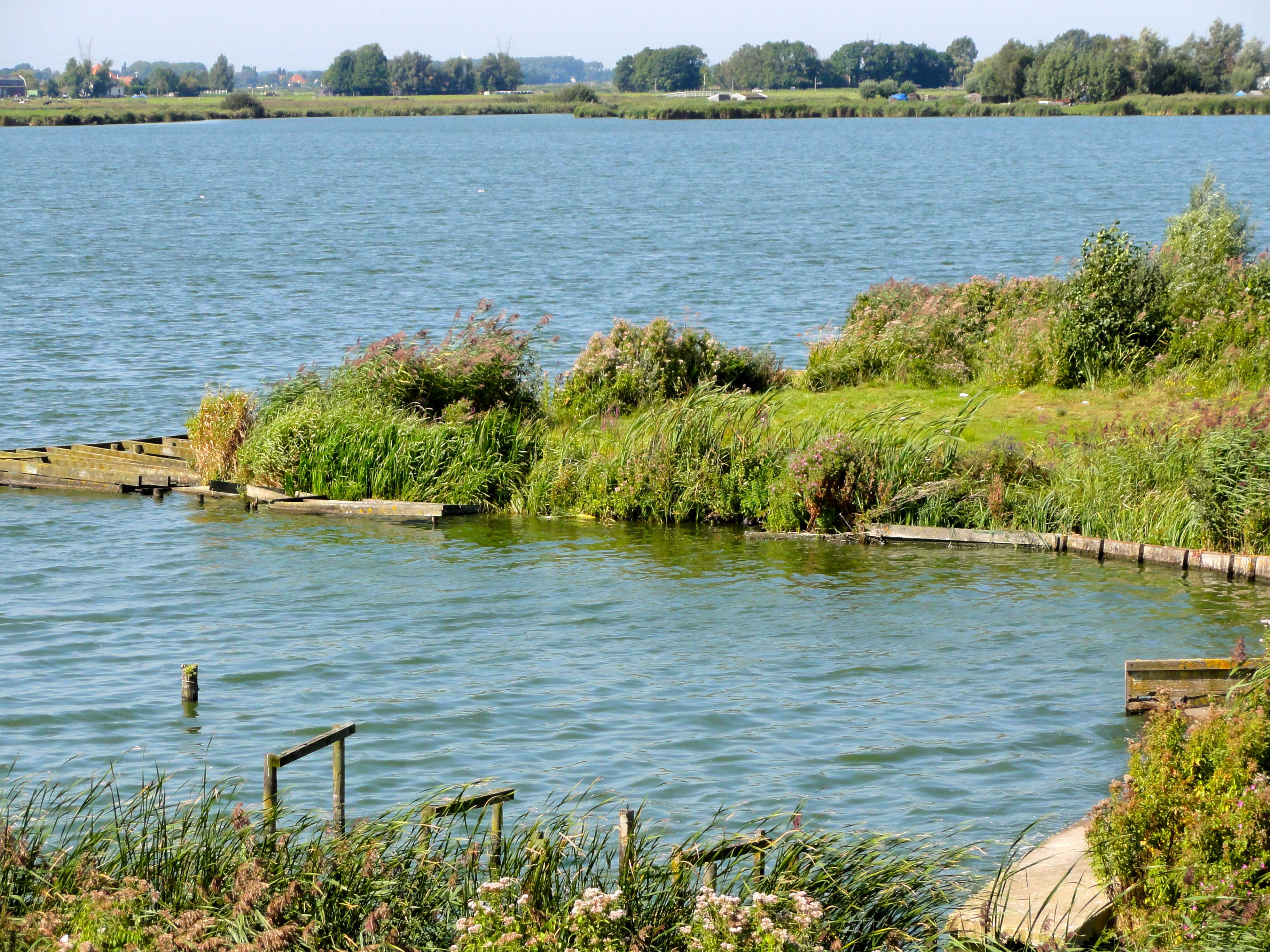 Kinselmeer